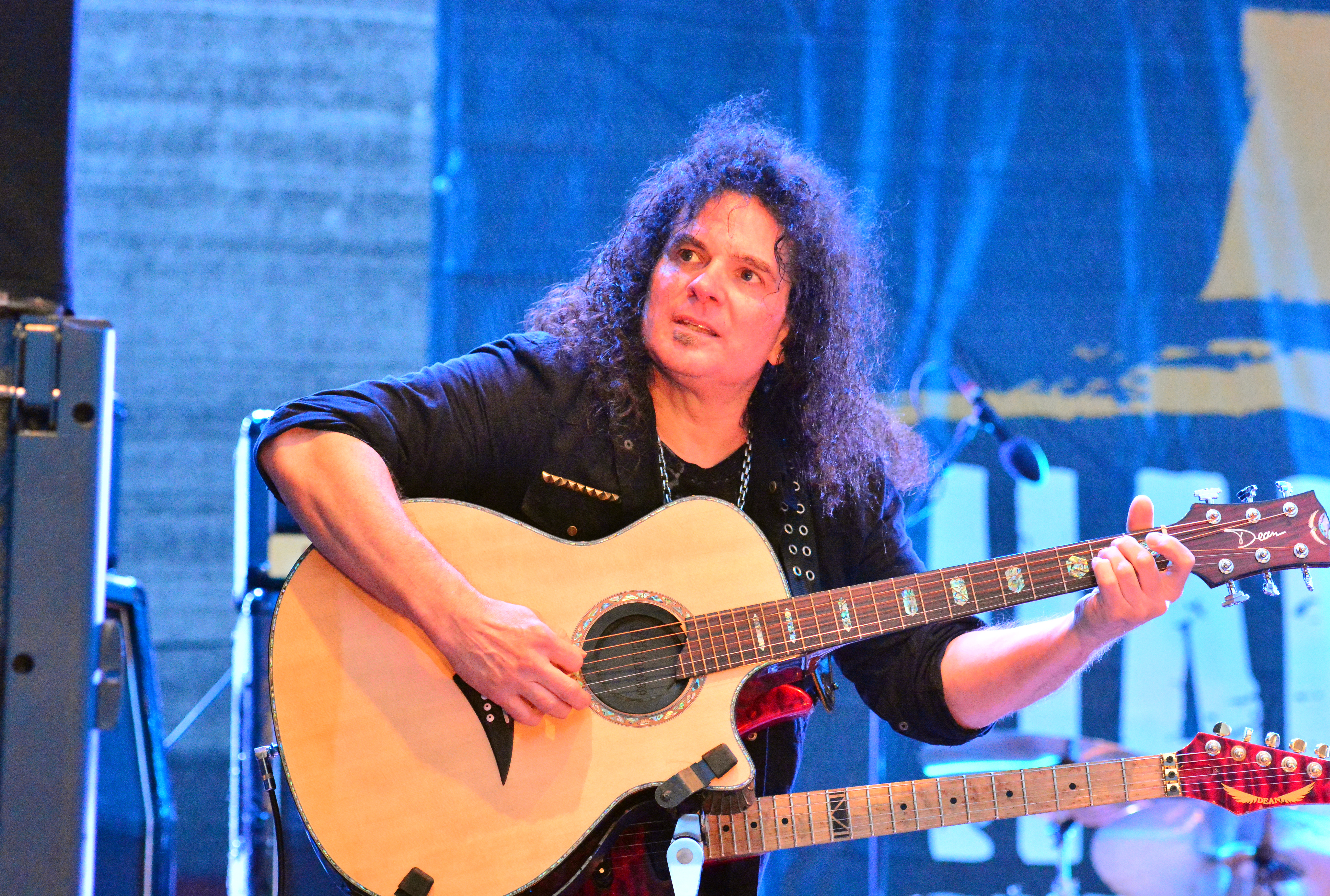 Vinnie Moore von UFO bei den „Hamburg Harley Days“